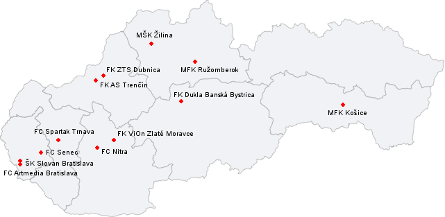 Mapa Slovenské fotbalové ligy 2007/08